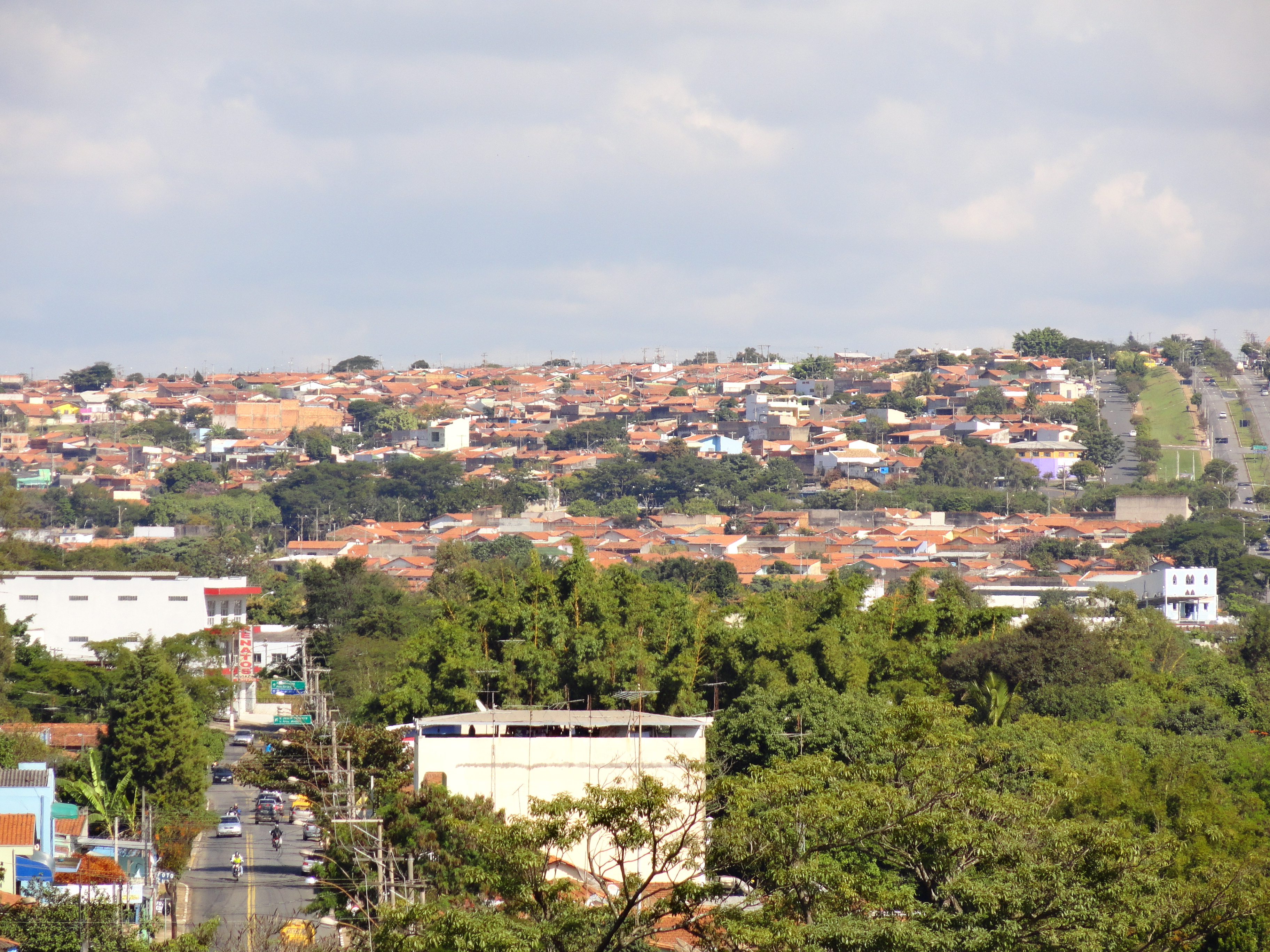 Vista de alguns bairros das regiões central e oeste de Paulínia, SP, Brasil